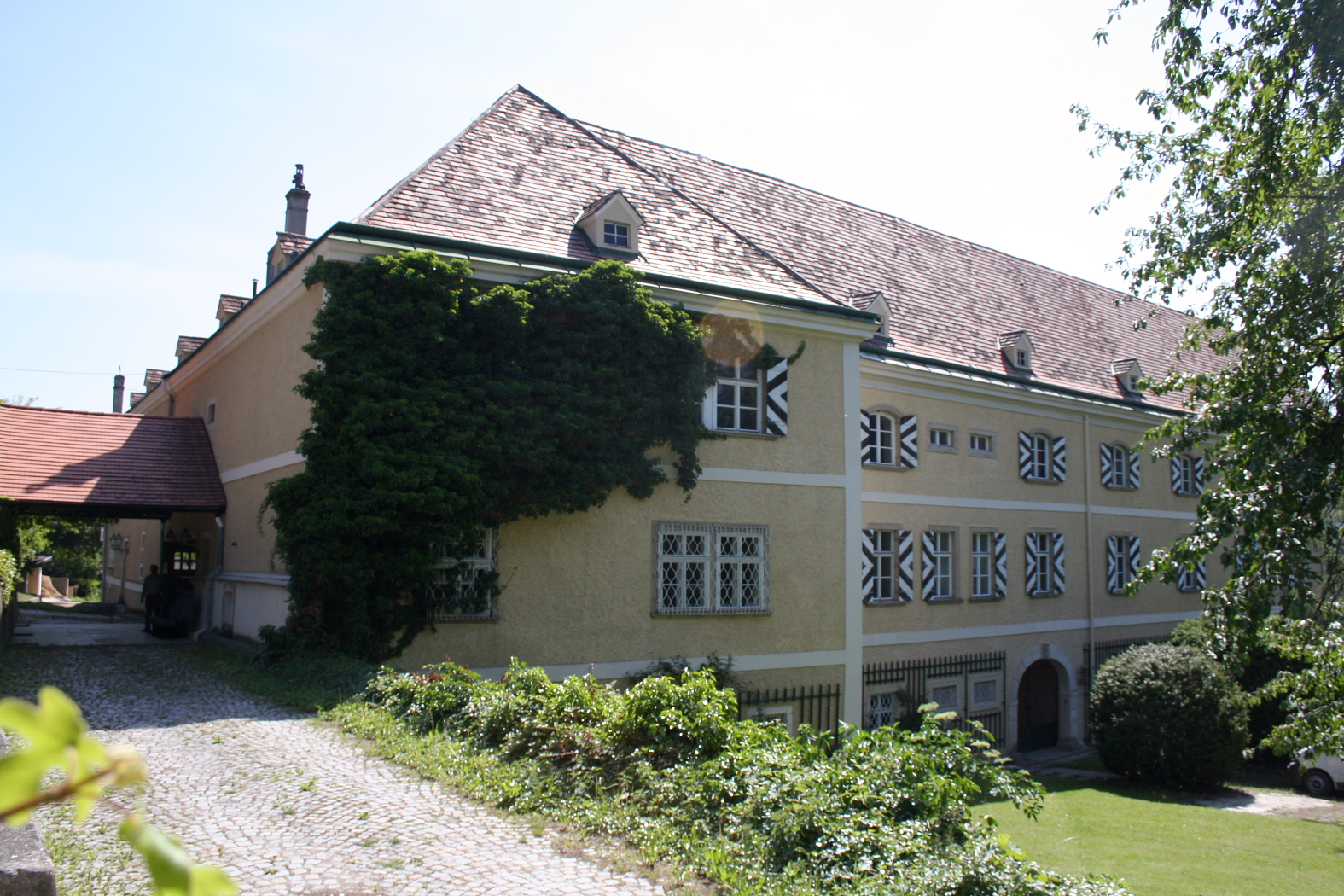 Das denkmalgeschützte Schloss Strelzhof in der niederösterreichischen Gemeinde Willendorf.